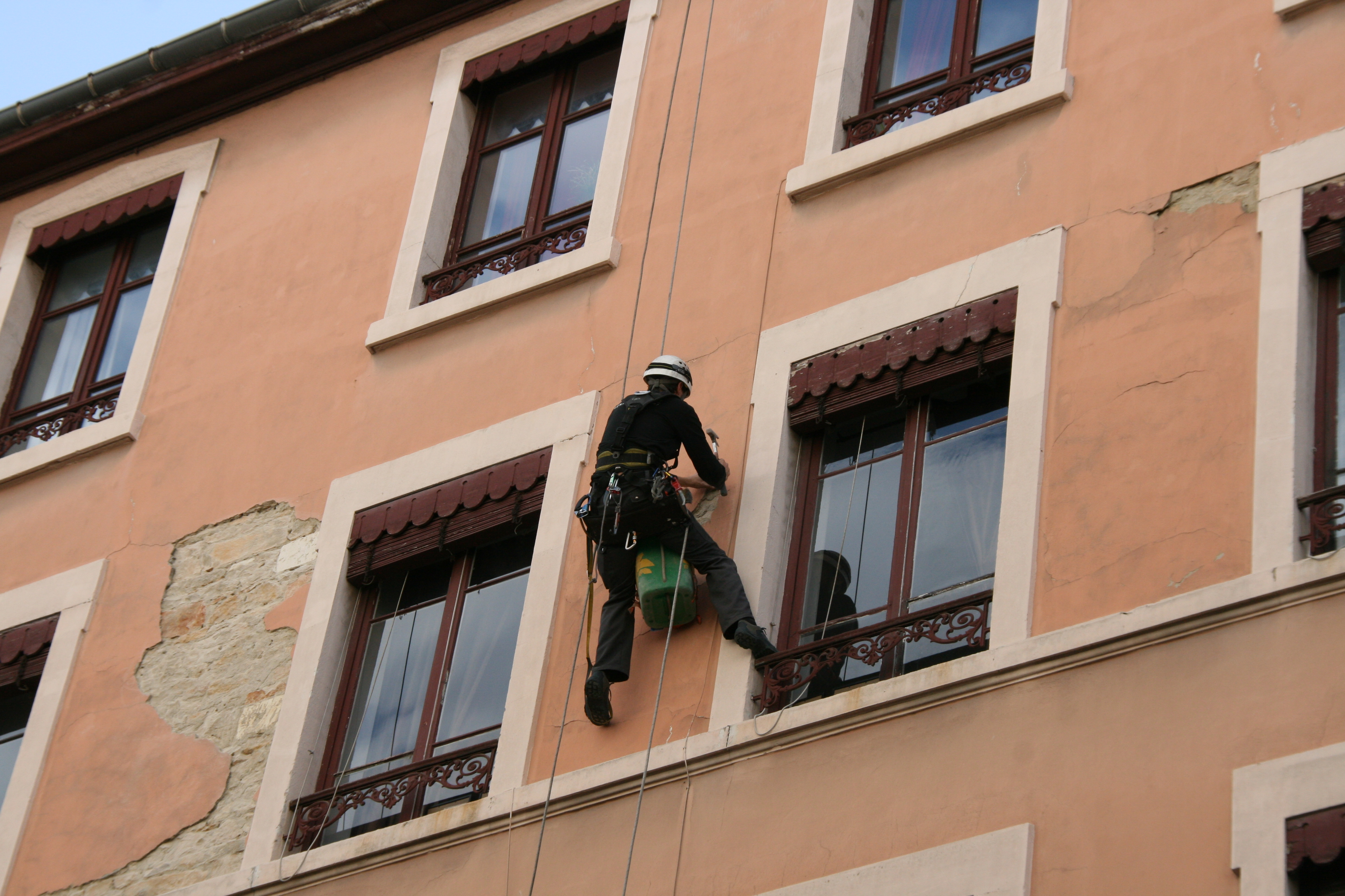 Cordiste effectuant une purge de sécurité sur façade d'immeuble